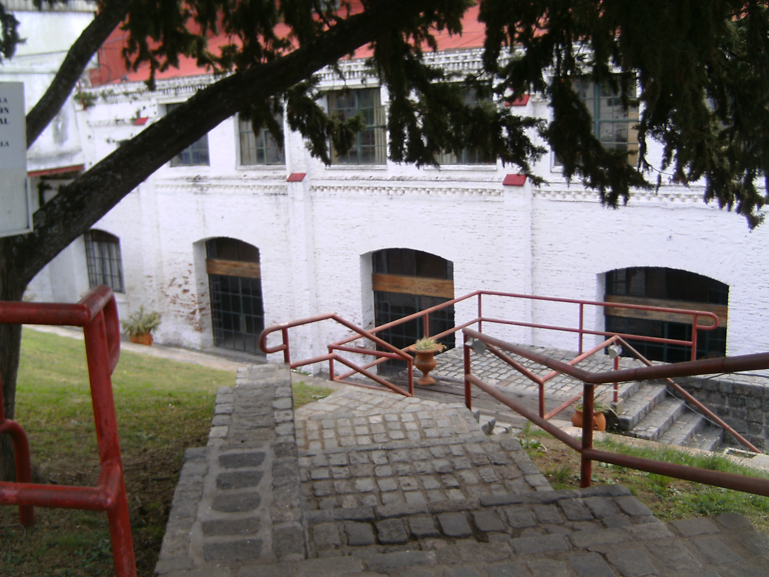 Edificación del Ex frigorífico Anglo, actualmente museo de la Revolución Industrial, ubicado en el departamento de Rio Negro-Uruguay.